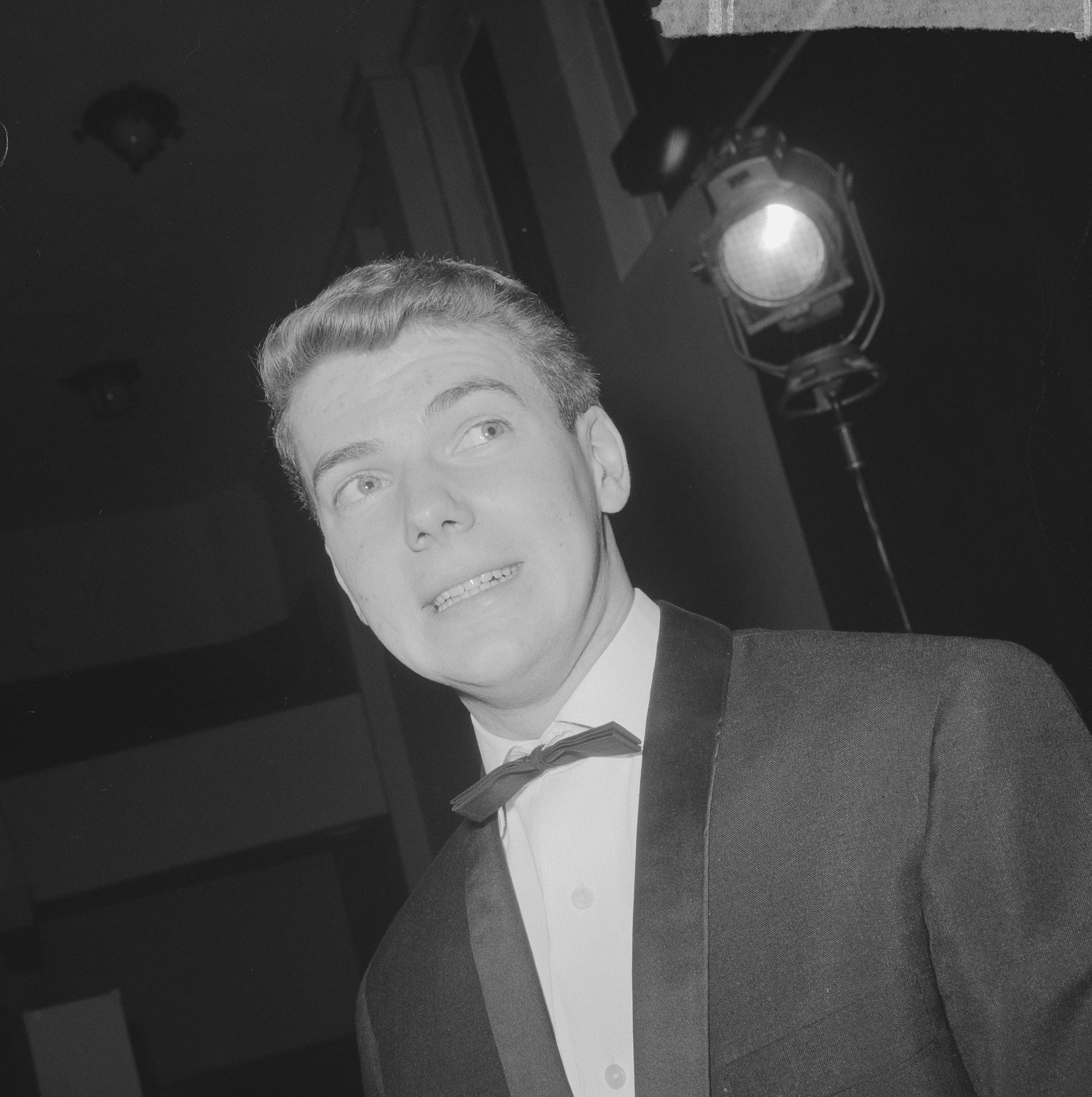 Collectie / Archief : Fotocollectie Anefo Reportage / Serie : [ onbekend ] Beschrijving : Finale Nationaal Songfestival 1965, Ronnie Tober Datum : 13 februari 1965 Trefwoorden : artiesten, muziek, portretten, songfestivals, zangers Persoonsnaam : Tober, Ronnie Instellingsnaam : Nationaal Songfestival Fotograaf : Nijs, Jac. de / Anefo Auteursrechthebbende : Nationaal Archief Materiaalsoort : Negatief (zwart/wit) Nummer archiefinventaris : bekijk toegang 2.24.01.03 Bestanddeelnummer : 917-4312